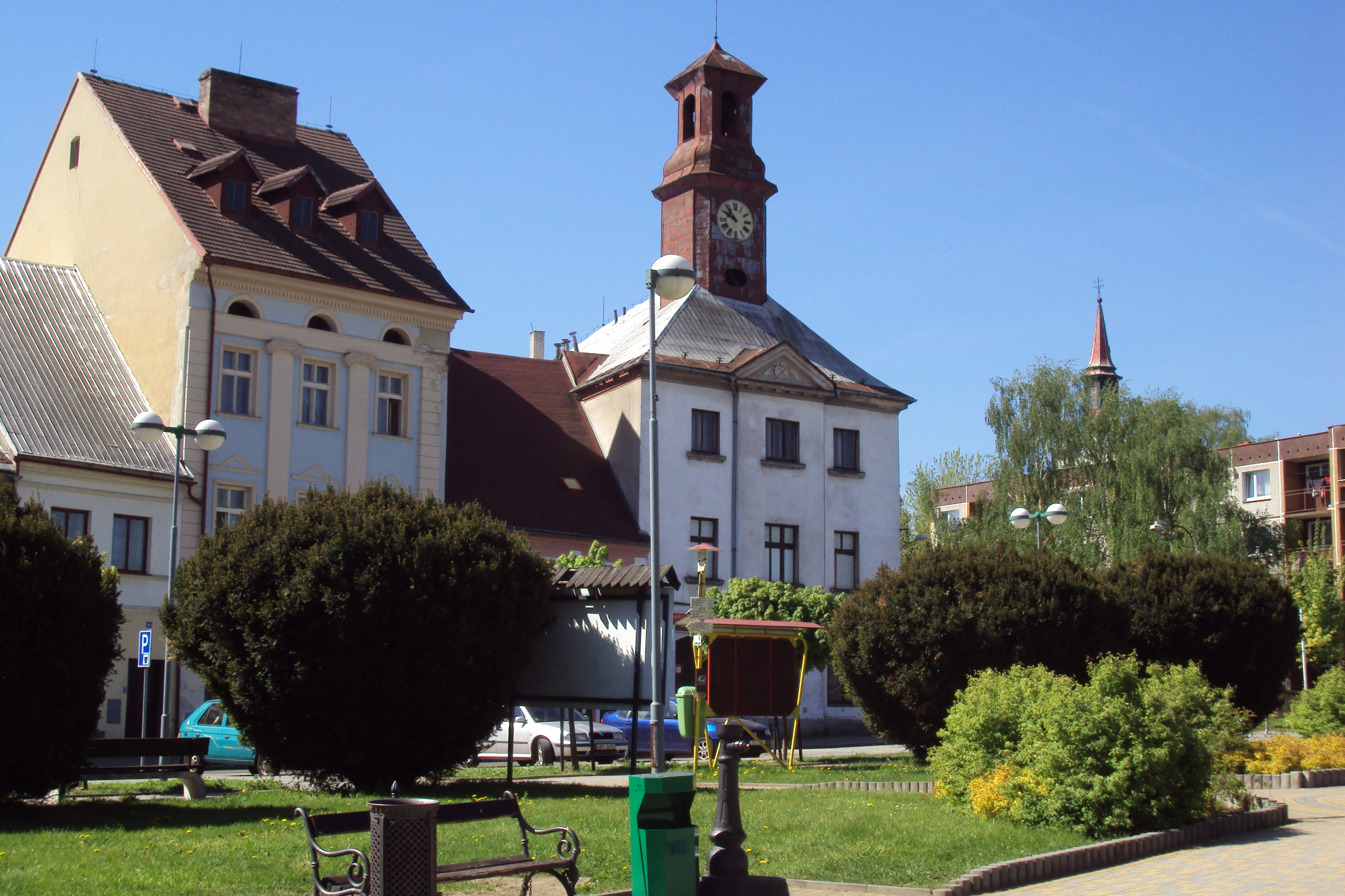 Restaurace Radnice na Náměstí Osvobození ve Cvikově